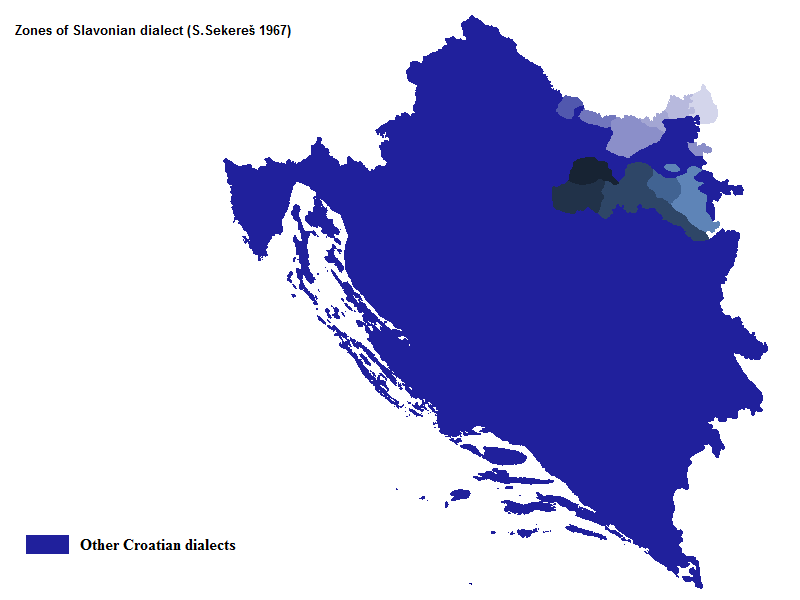 Zone Slavonskog po S. Sekerešu